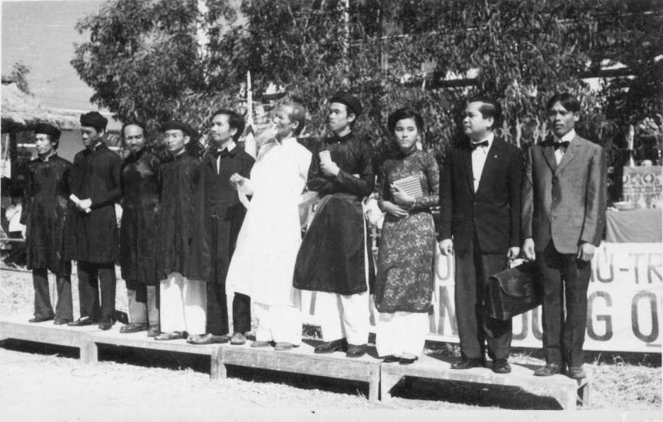 Các giáo-sư của Đông-Kinh nghĩa-thục. Bìa phải là giáo-sư Phan-châu-Trinh.